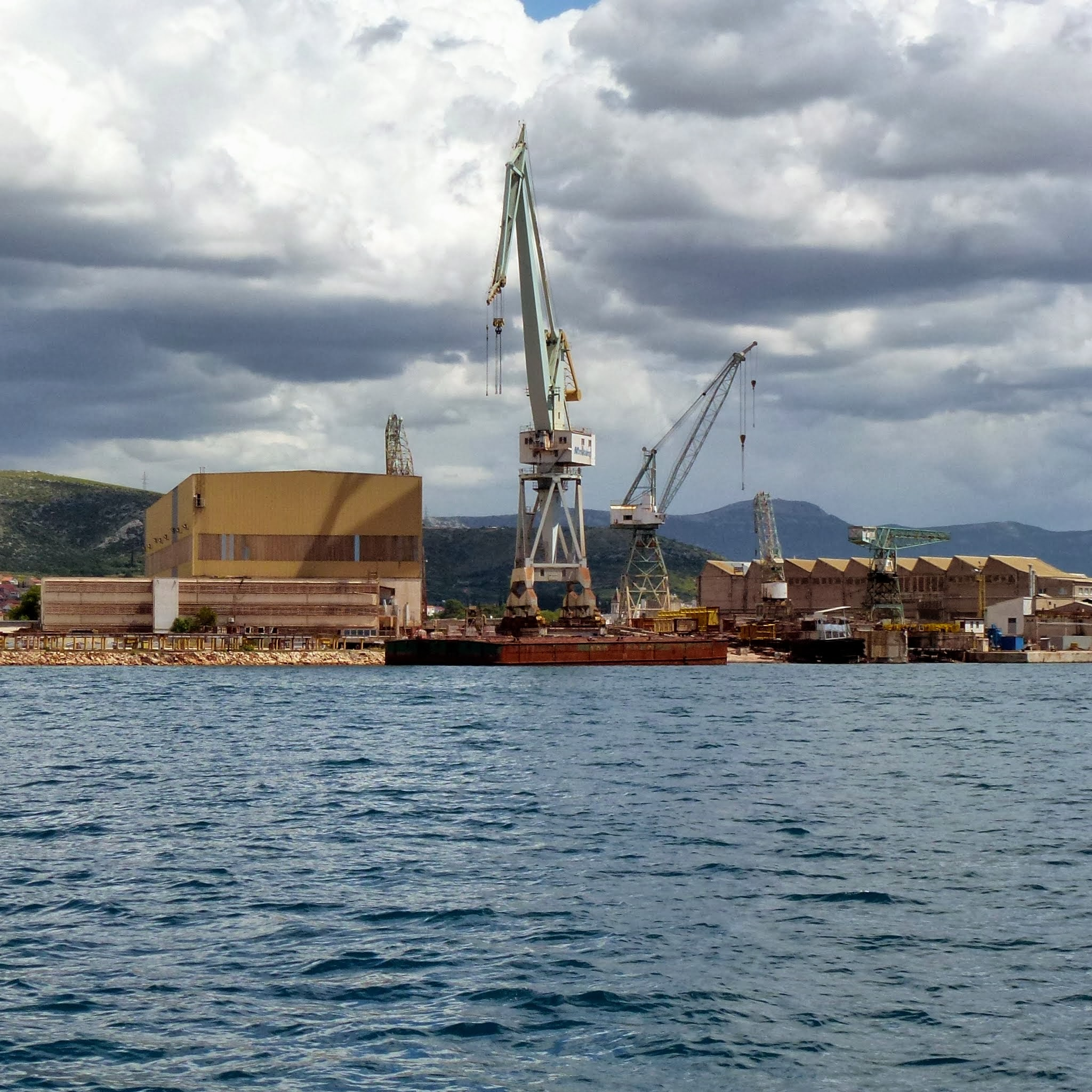 Трогирские верфи, Croatia